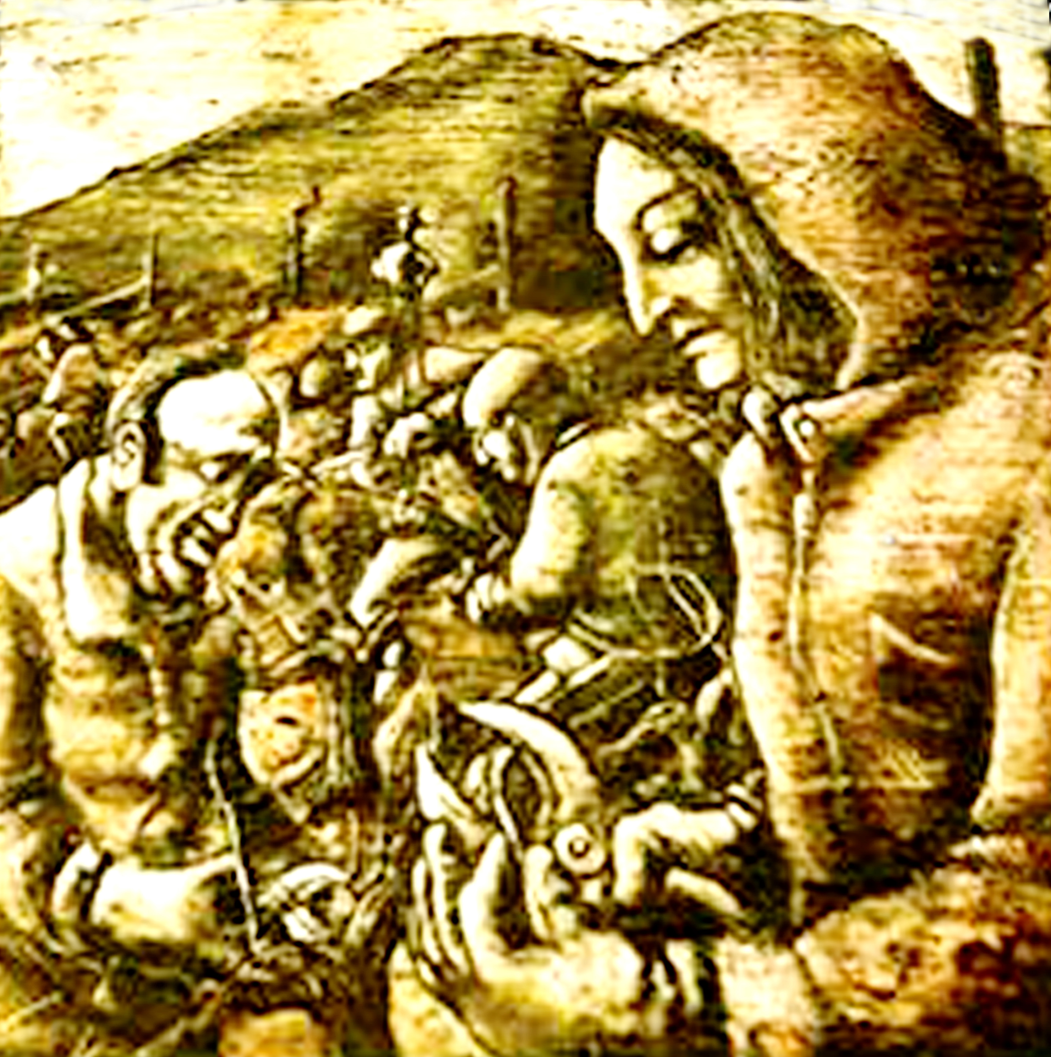 Vendanges en Savoie, sur une ancienne étiquette de mousseux rosé